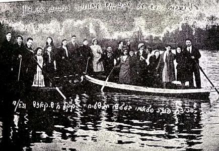 קבוצת חברים של הנוער